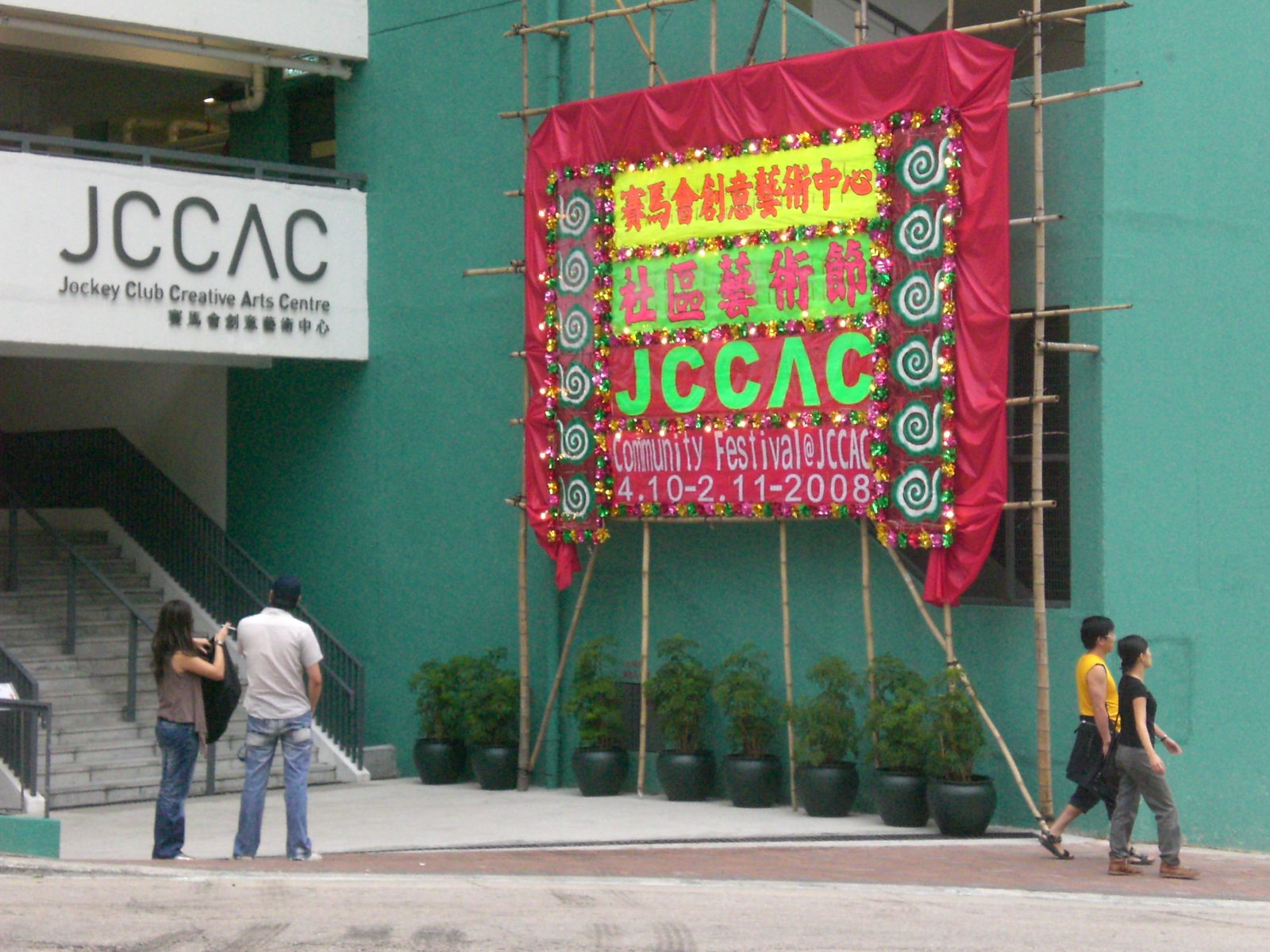 深水埗石硤尾賽馬會創意藝術中心, JCCAC.